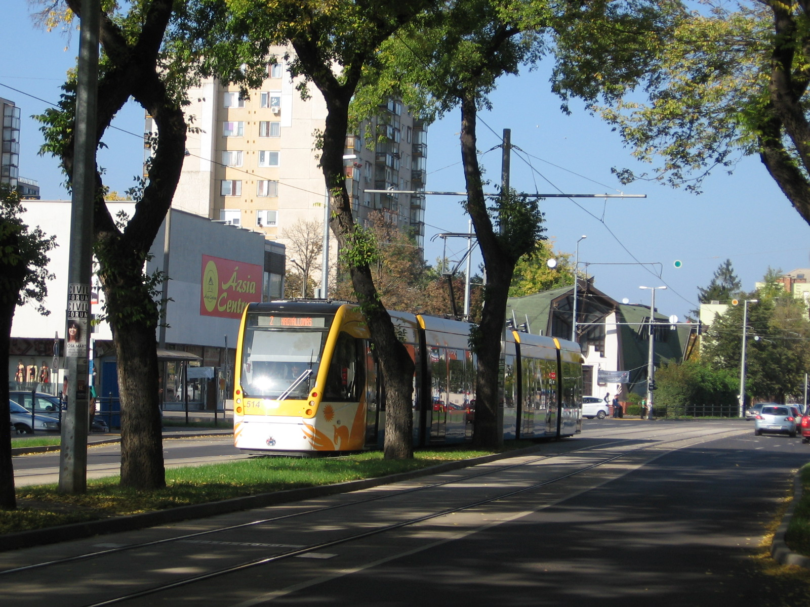 Villamos a Nádor után